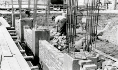 Kulturhaus Plessa, Platz des Friedens 1, 04928 Plessa.